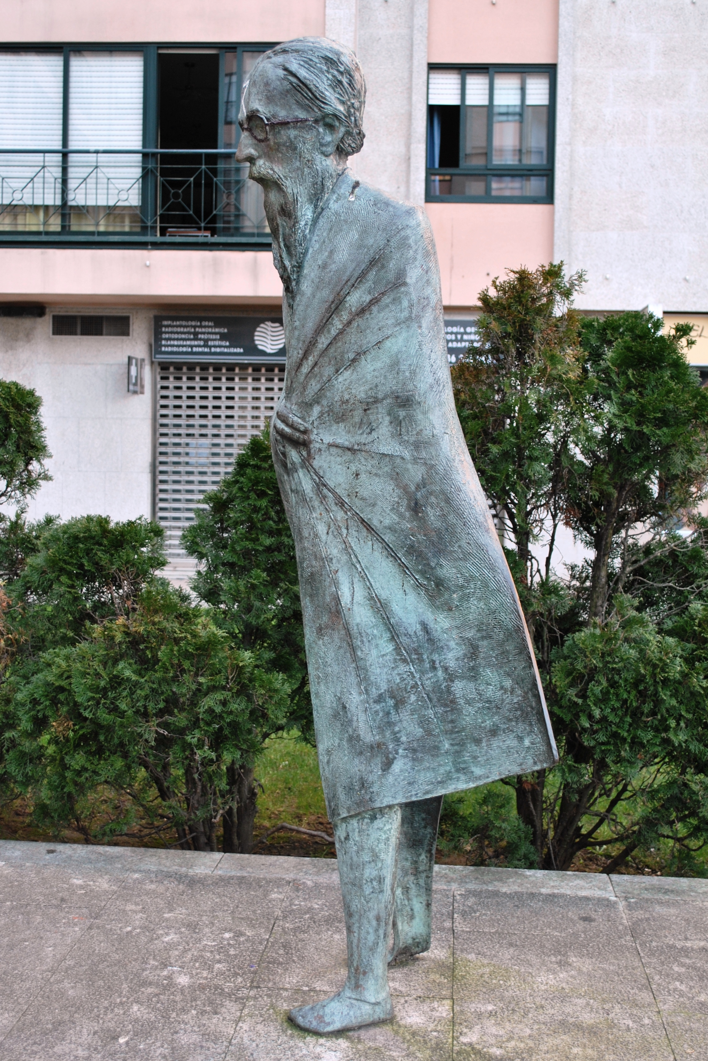 Conxunto de Buciños en Bouzas, Valle-Inclán.jpg